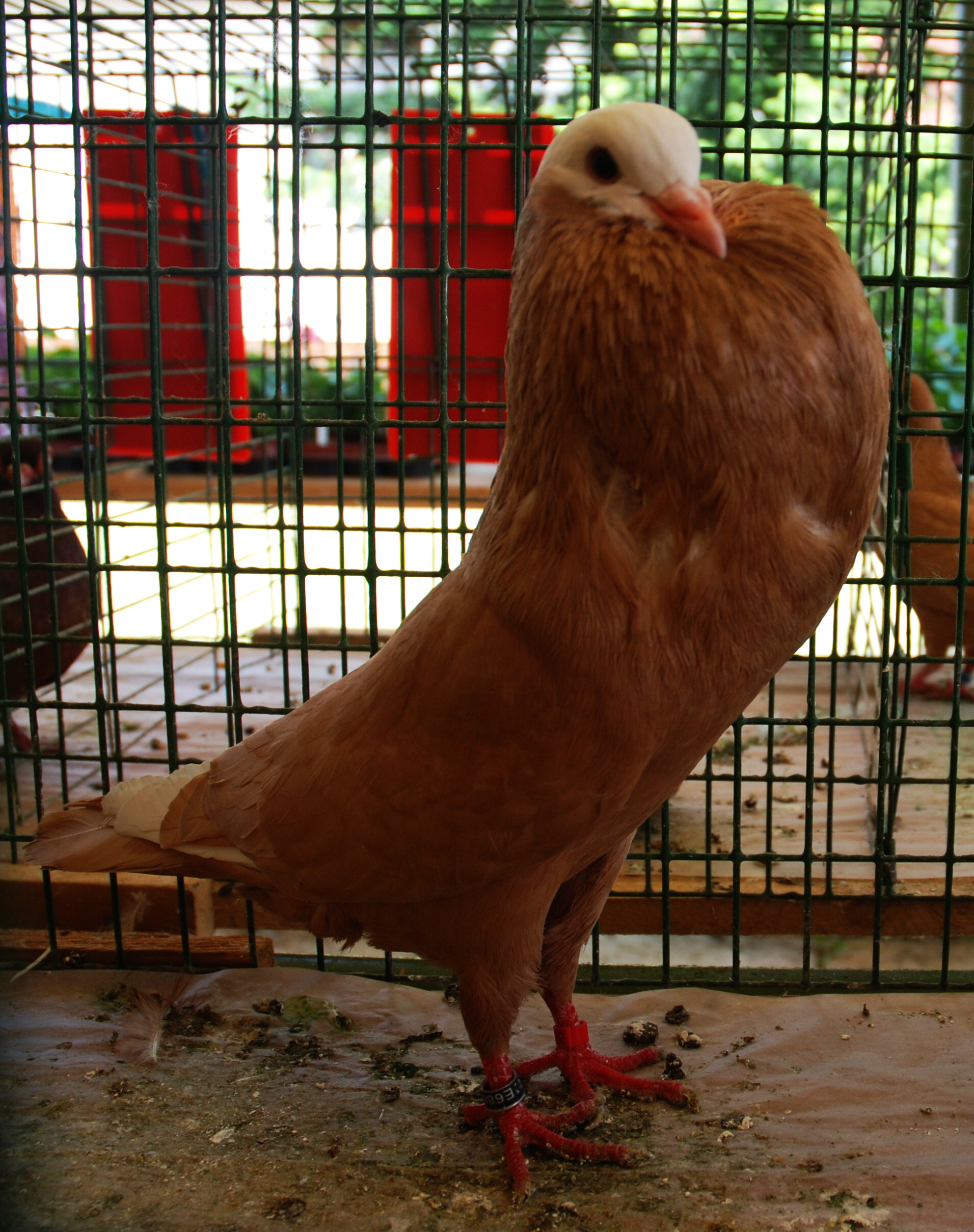 slovenský voláč žlutý